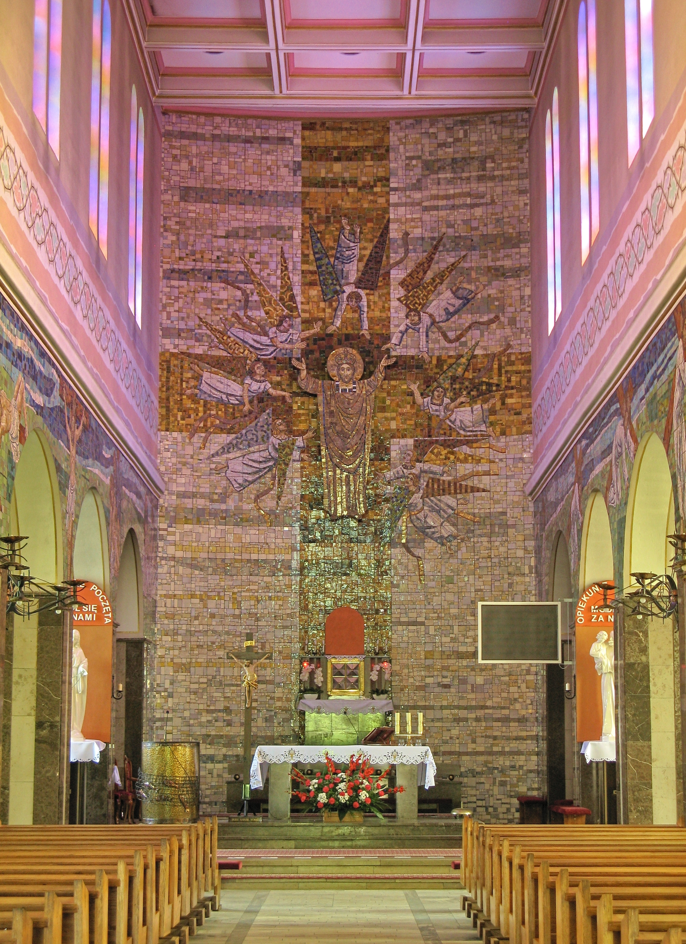 mozaika w kościele Chrystusa Króla w Żywcu-Sporyszu